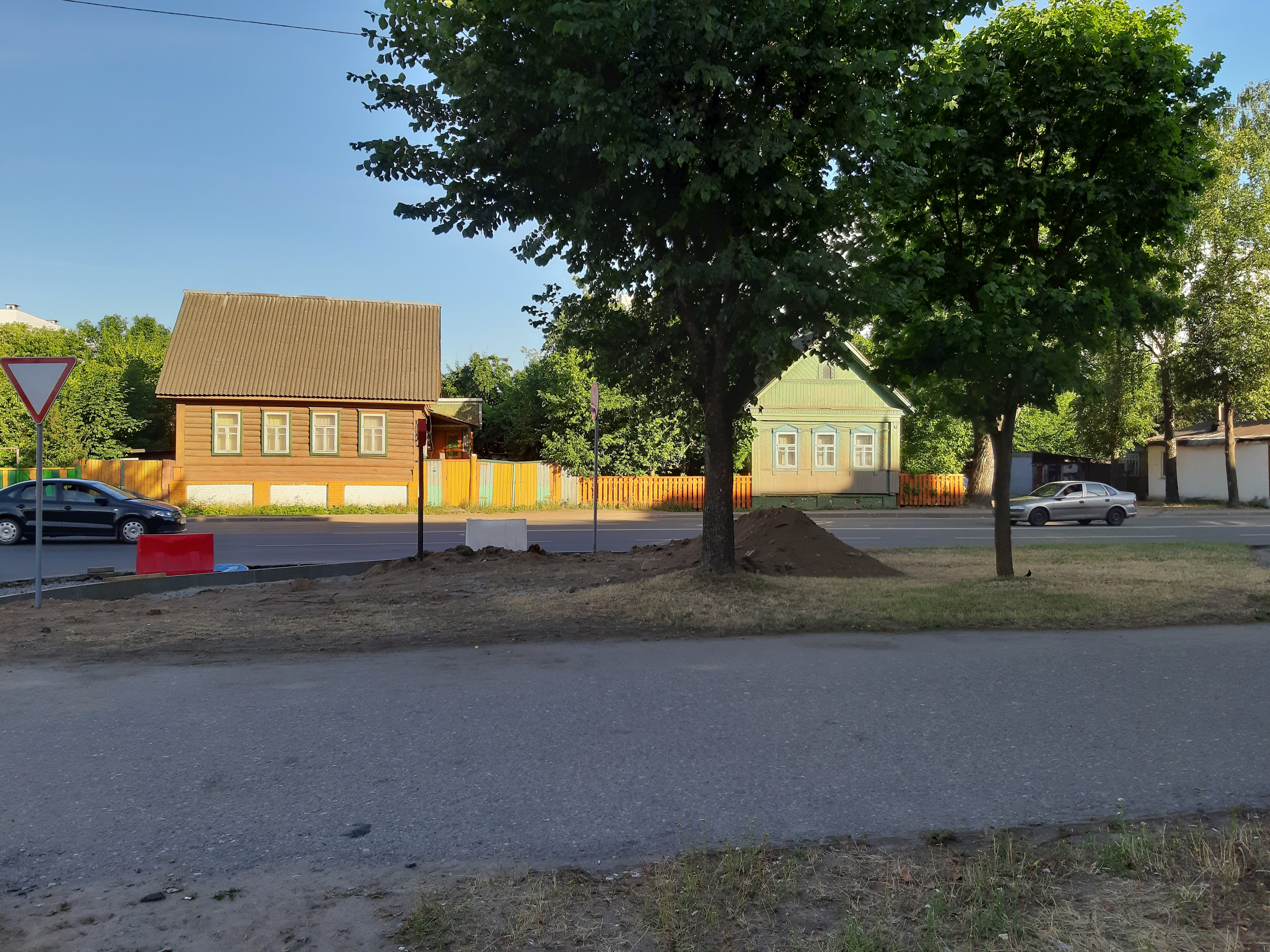 Магілёў. Лупалава між Пушкінскім і Непакорных